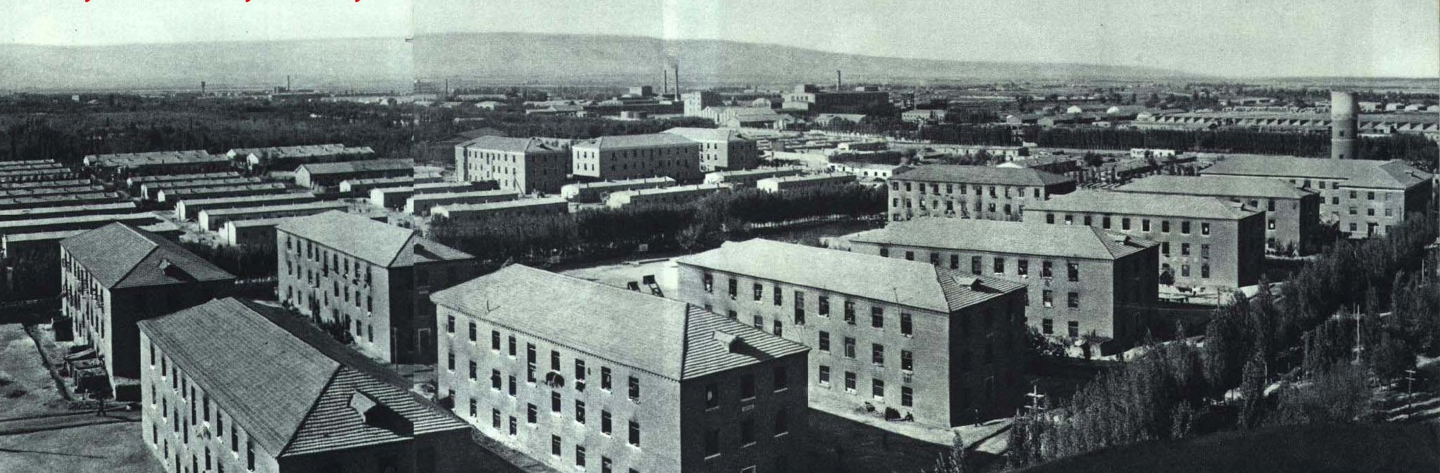 1965-5 1965年 石河子新城